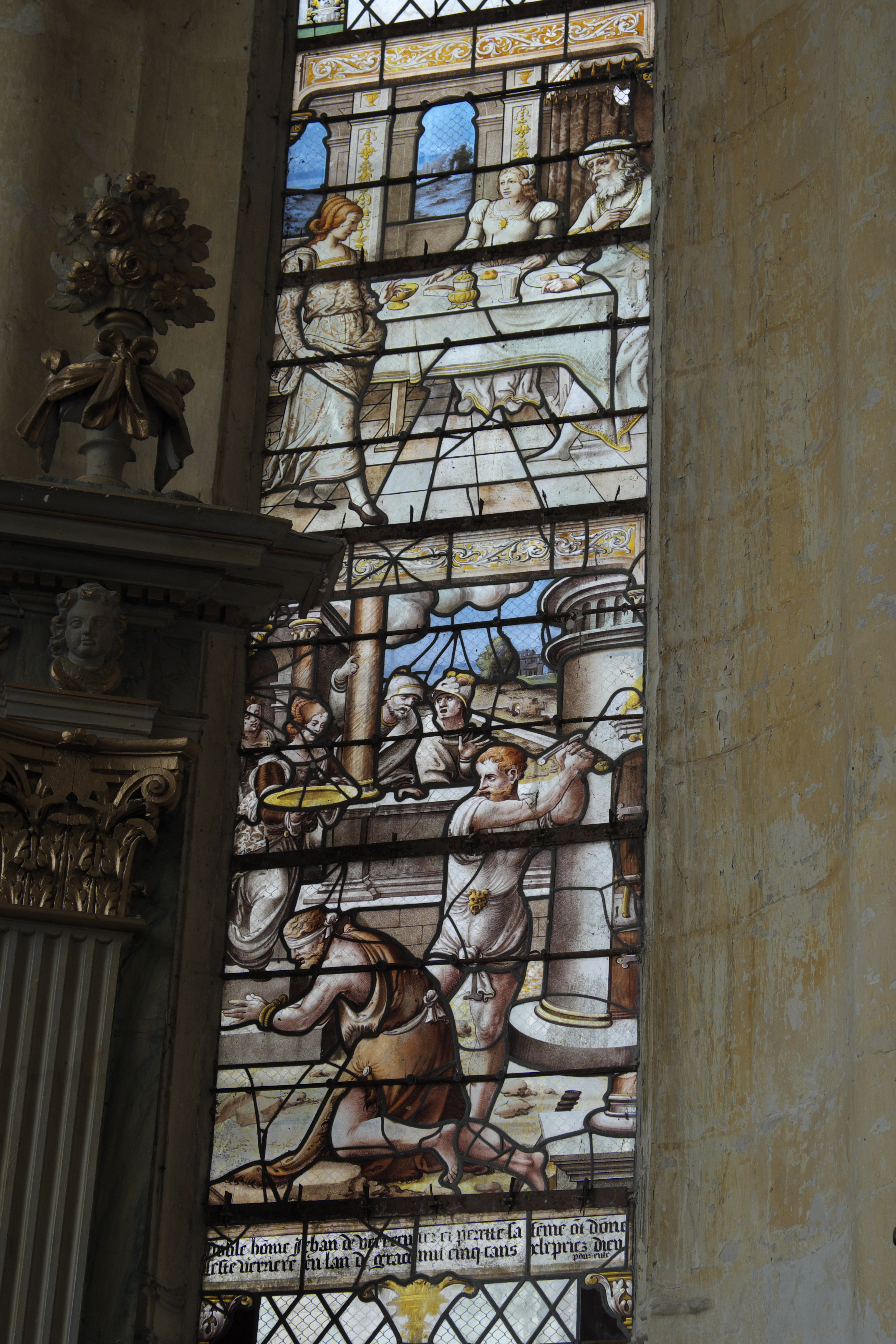 Katholische Kirche Saint-Georges in Chavanges im Département Aube (Champagne-Ardenne/Frankreich), Bleiglasfenster aus dem 16. Jahrhundert, Grisaillefenster; Darstellung: Salomé (oben), Enthauptung von Johannes dem Täufer (unten) .